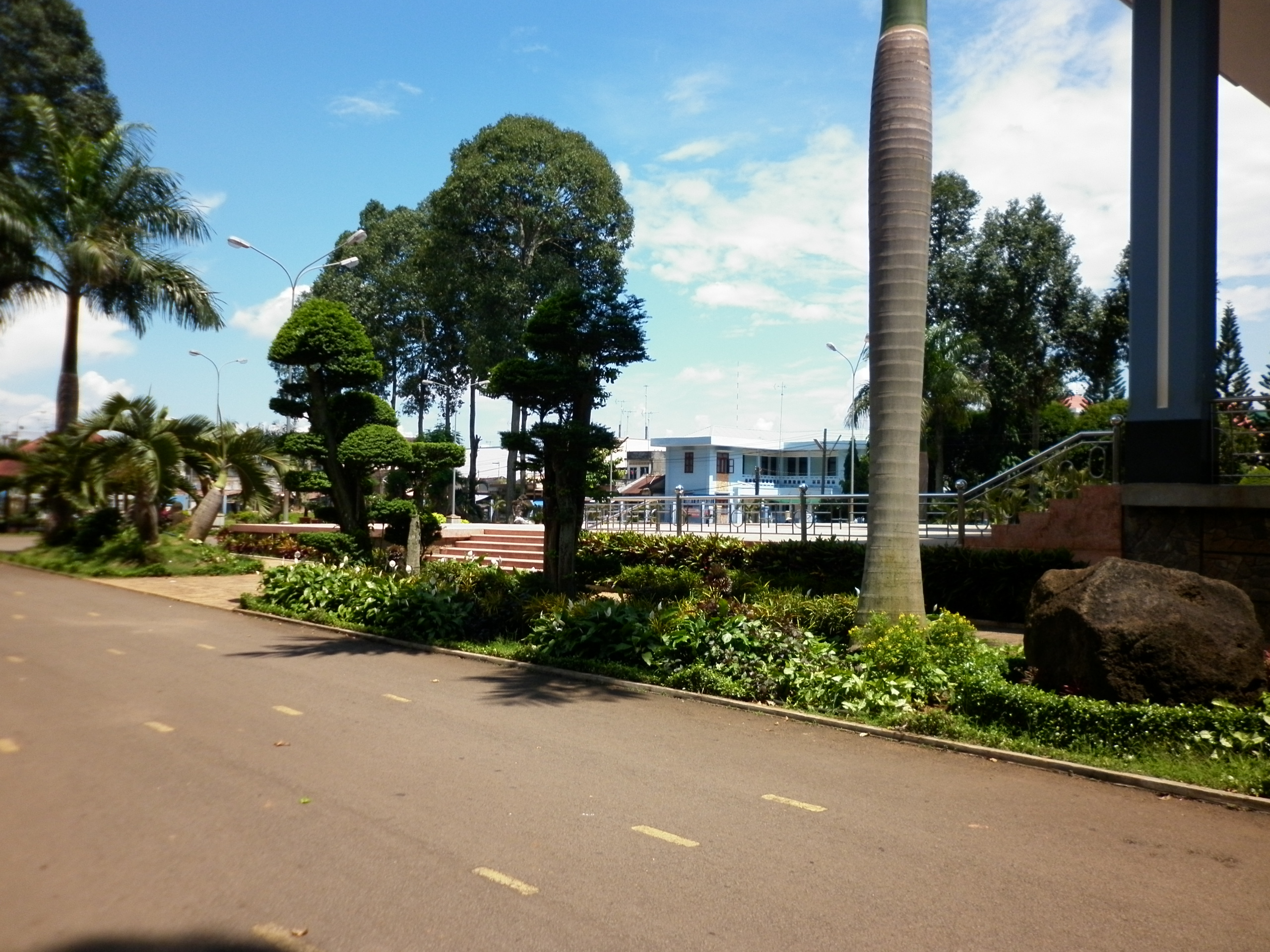 bên hông nhà thờ